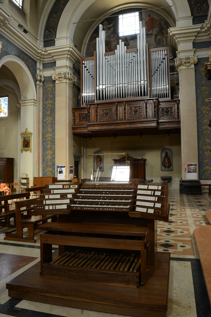 Organo della chiesa parrocchiale di S.Anastasia Villasanta. Cantoria nord.